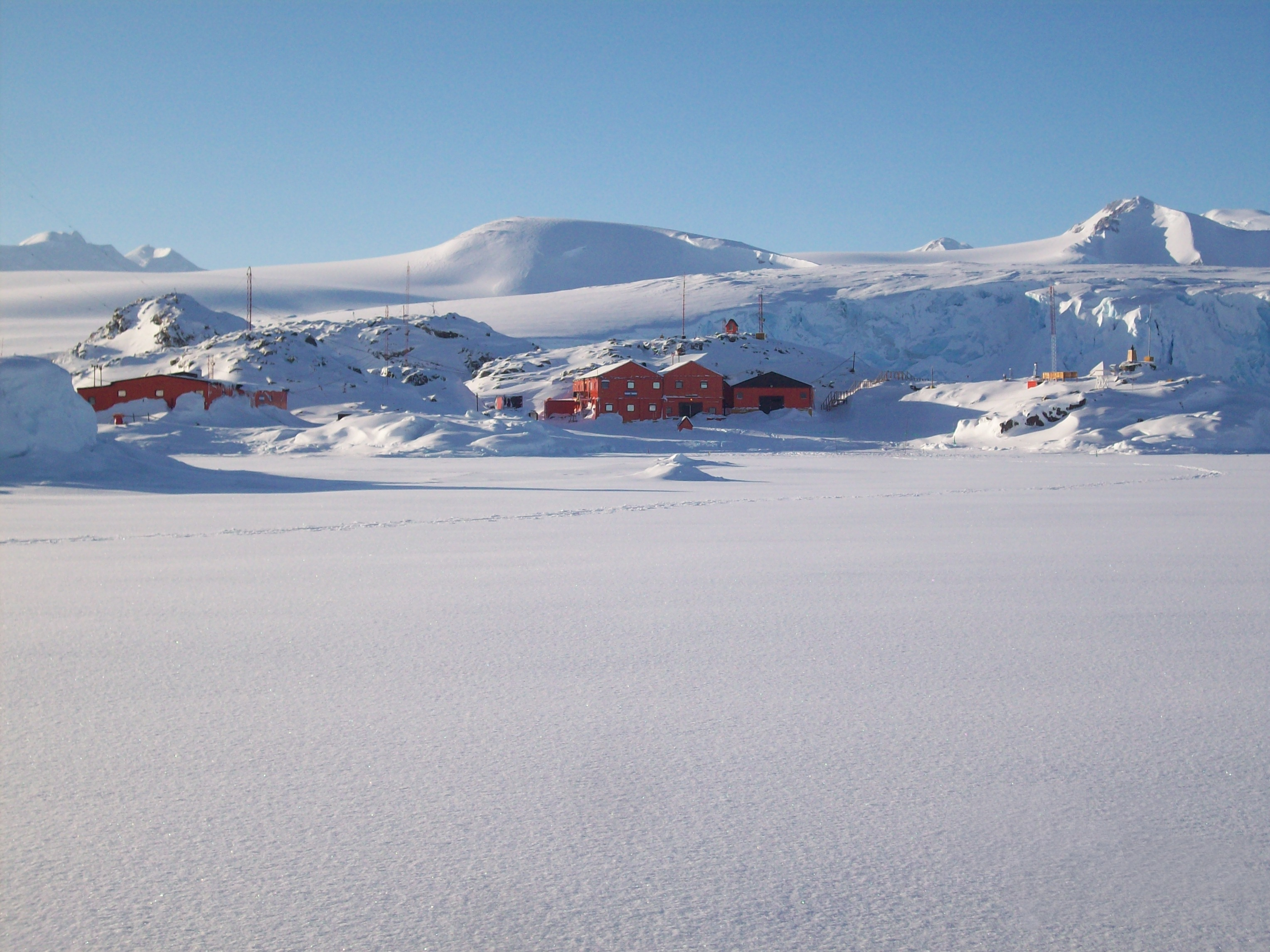 BASE ANTARTICA ARGENTINA SAN MARTIN